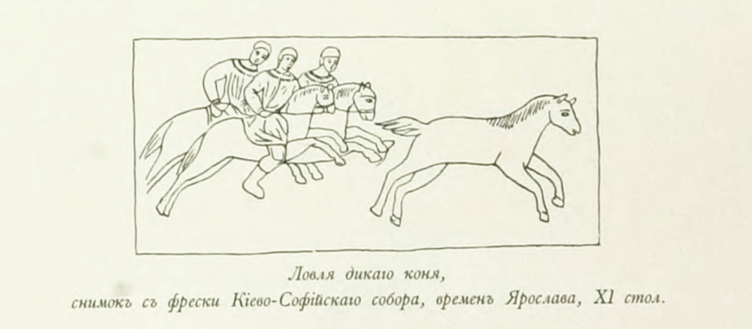 Великокняжеская, царская и императорская охота на Руси